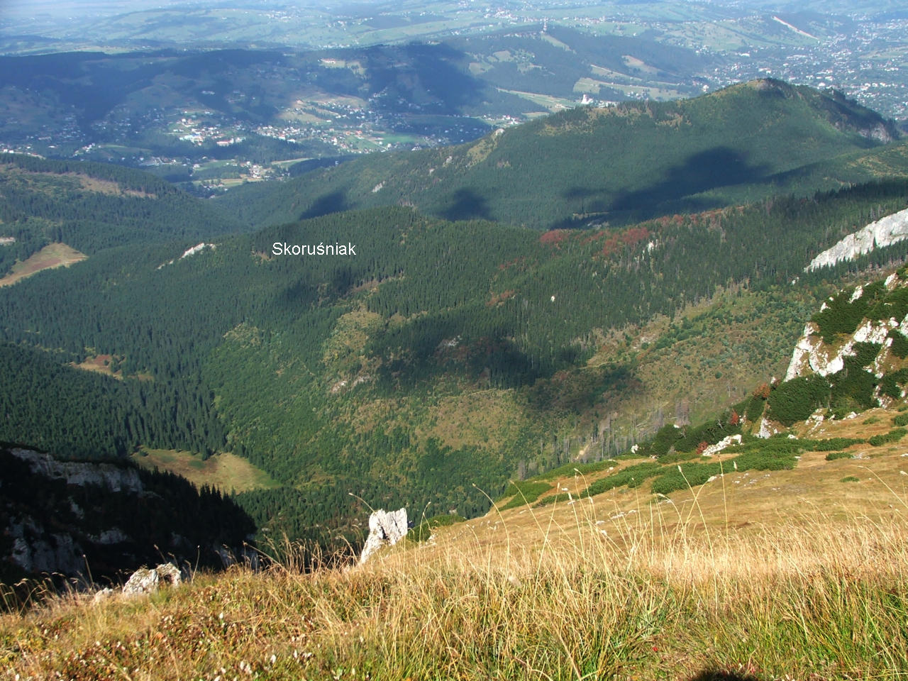 Dolina Miętusia, Skoruśniak, Grzybowiec